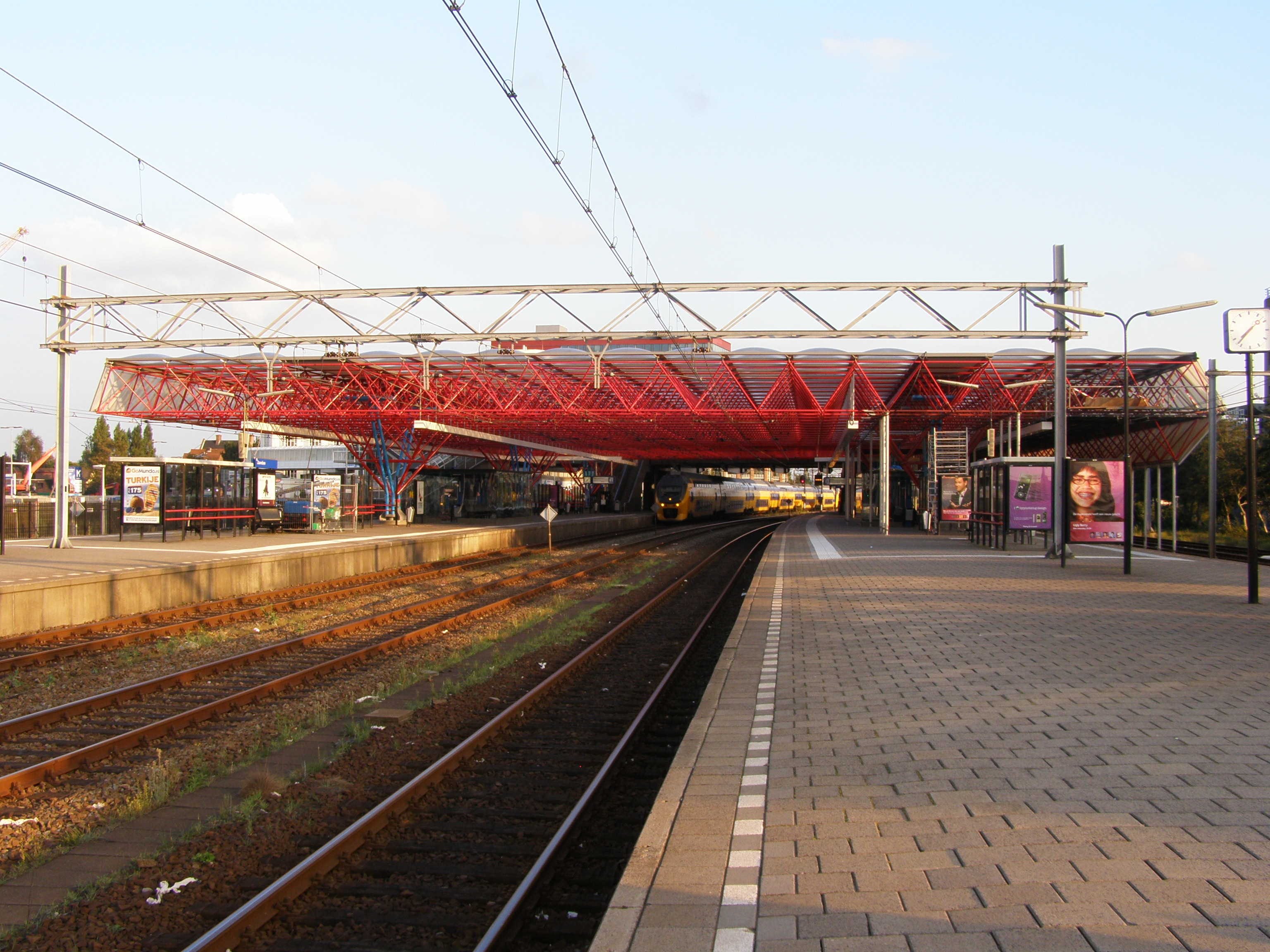 Foto van Station Zaandam vanaf Noordzijde